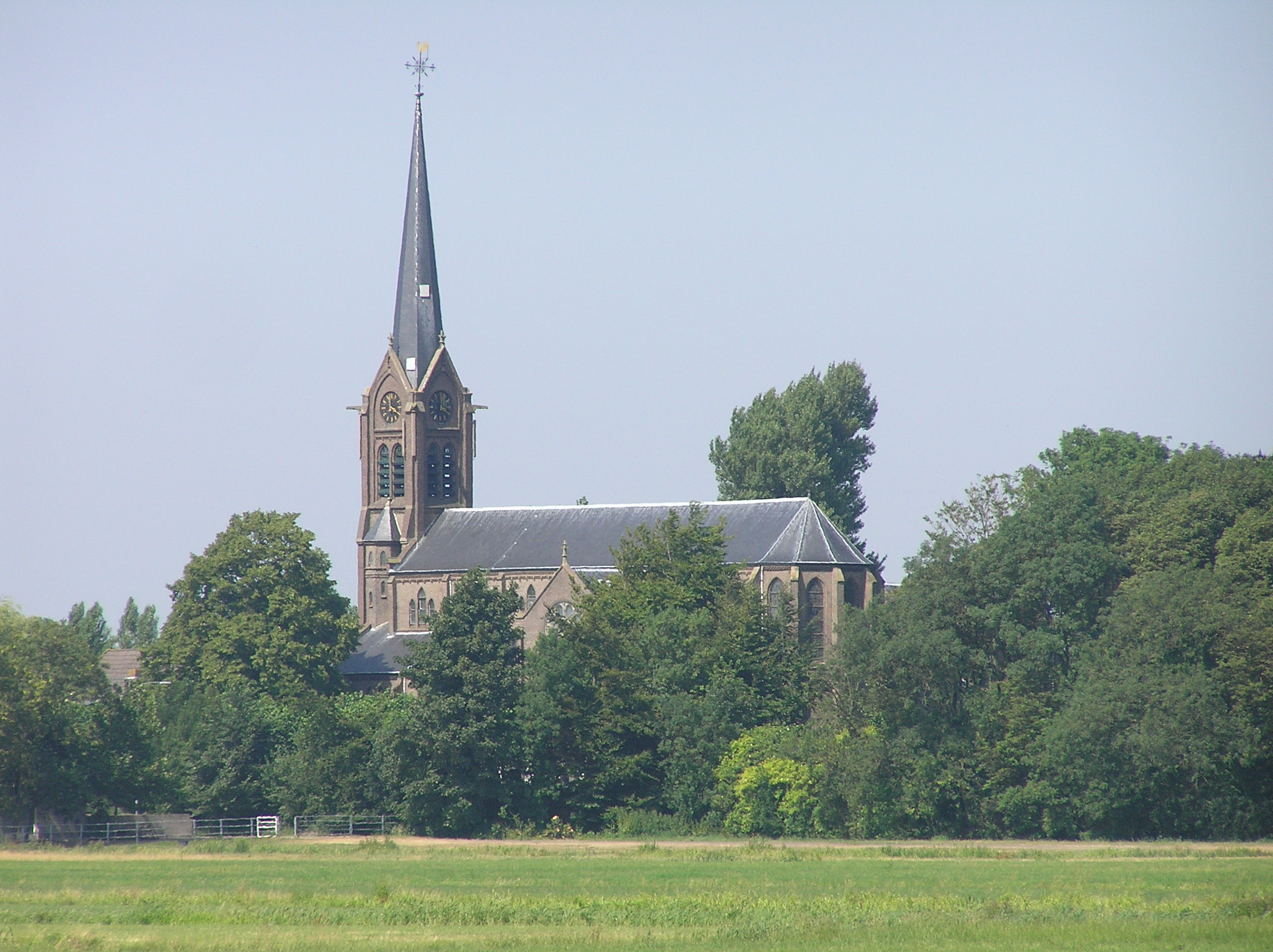 Laurentiuskerk, Stompwijk, the Netherlands